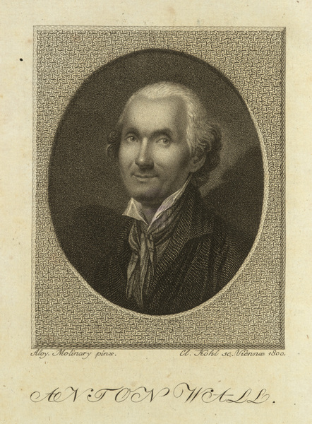 Porträt von Anton Wall [= Christian Leberecht Heyne] Stich von Clemens Kohl, Wien 1800. Nachstich von Molinary. Halberstadt, Gleimhaus, Inventar-Nr. P3 Heyne CL 1, alte Inventar-Nr. Ca 1280, alte Katalog-Nr. a.B.